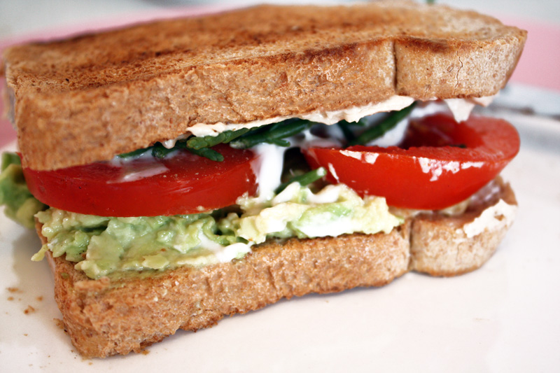 Vegan sandwich